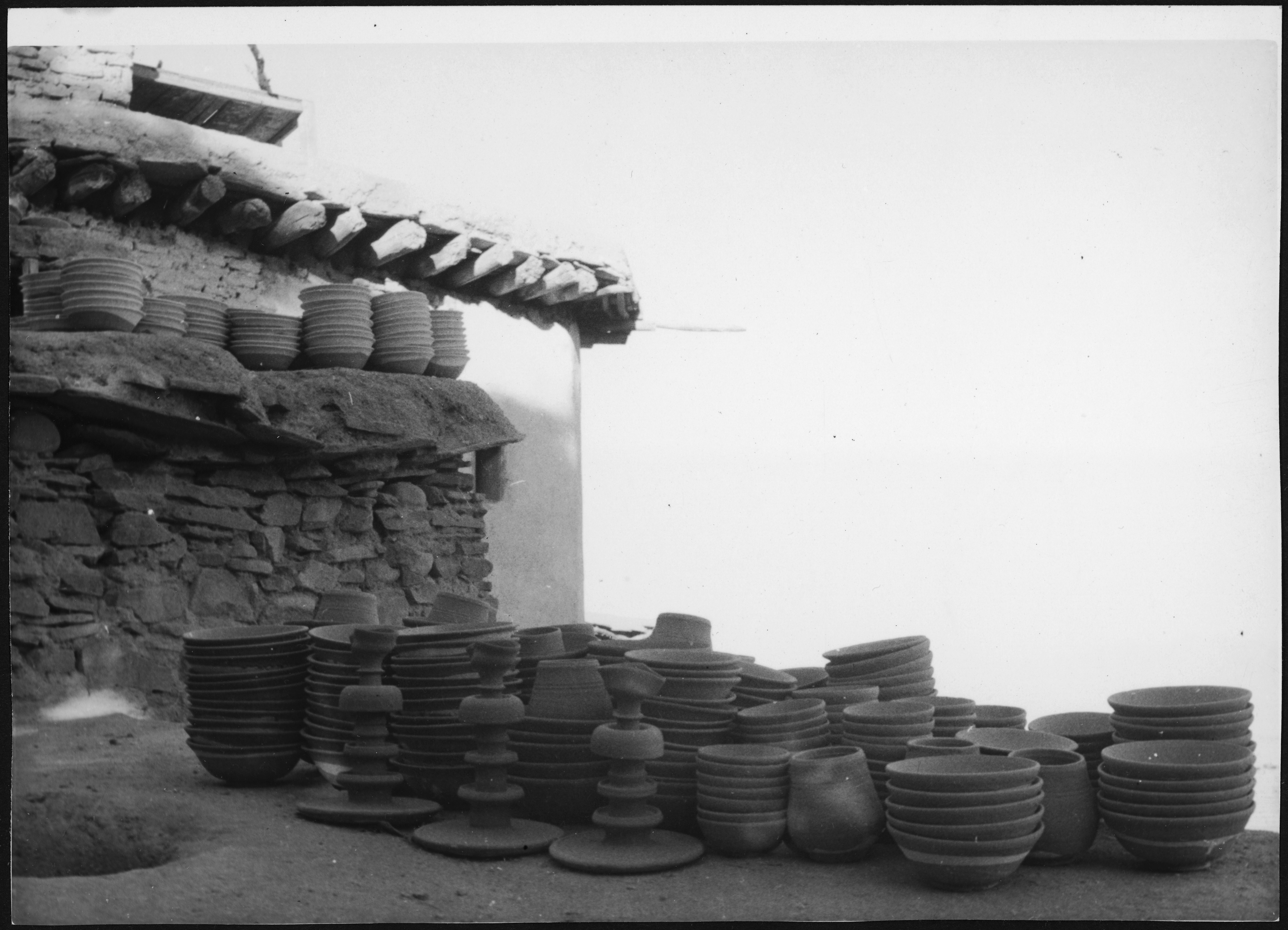 Afghanistan, Jstalif (Istalif): Gebäude; Aufgestappelte Töpferwaren vor einer Hauswand